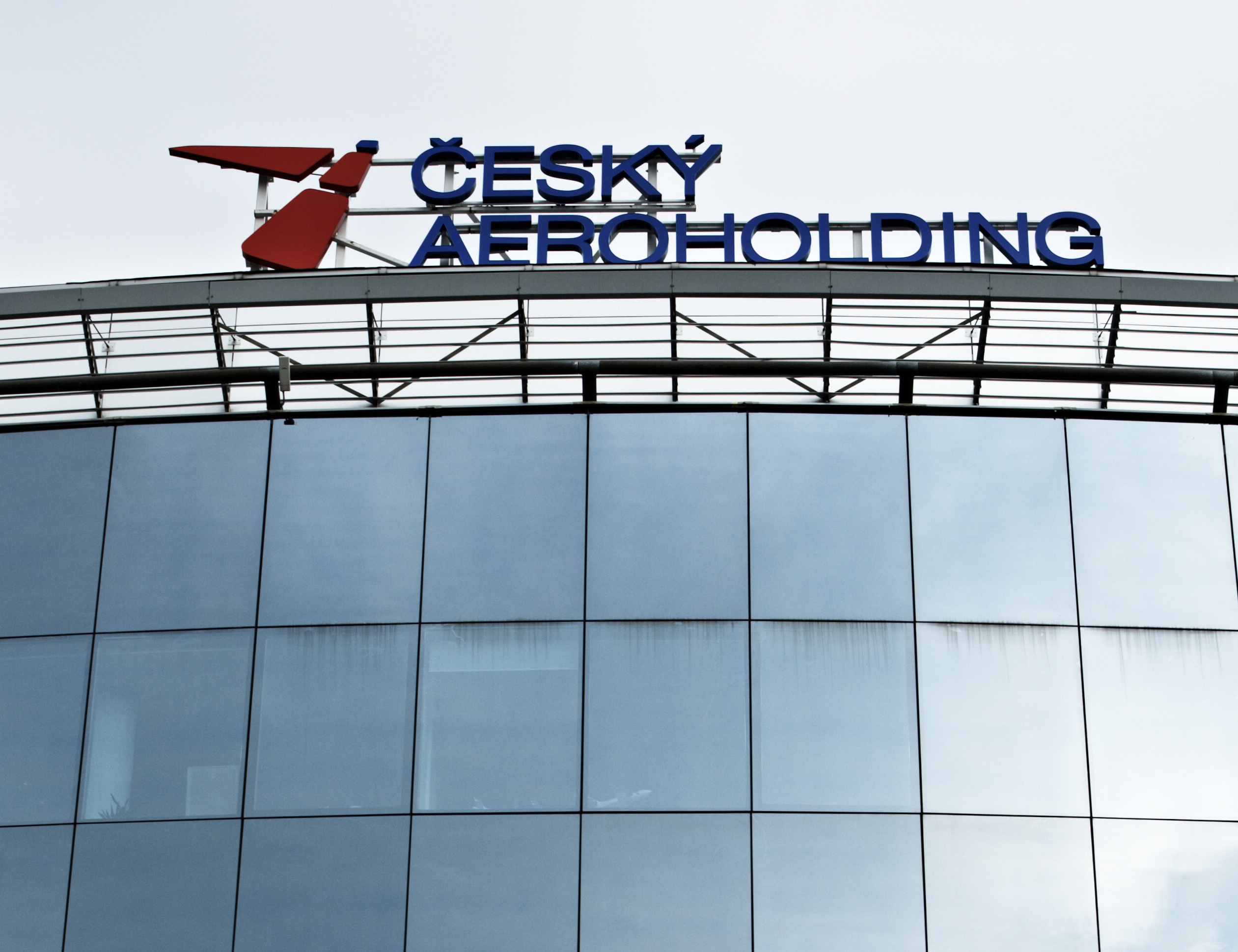 Sídlo společnosti Český Aeroholding, a.s.